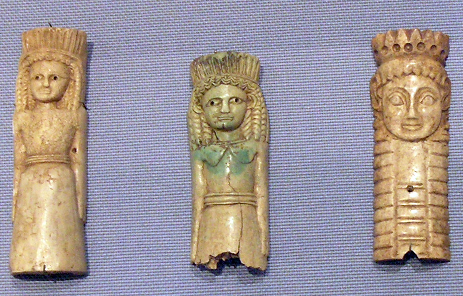 Protomés de la déesse Artémis Orthia, représentée avec une couronne de roseaux. Ex-votos en ivoire provenant du sanctuaire. Musée national archéologique d'Athènes.